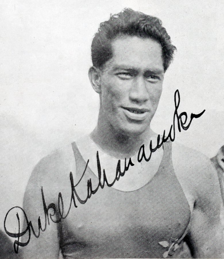 Duke Kahanamoku - El Gráfico 127 (03 de Diciembre de 1921)